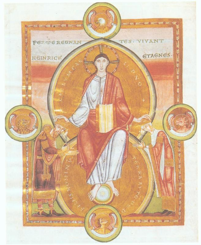 Der Codex Caesareus, der im Kloster Echternach geschrieben und illuminiert wurde, zeigt die Krönung des Kaiserpaares Heinrich III. und Agnes.